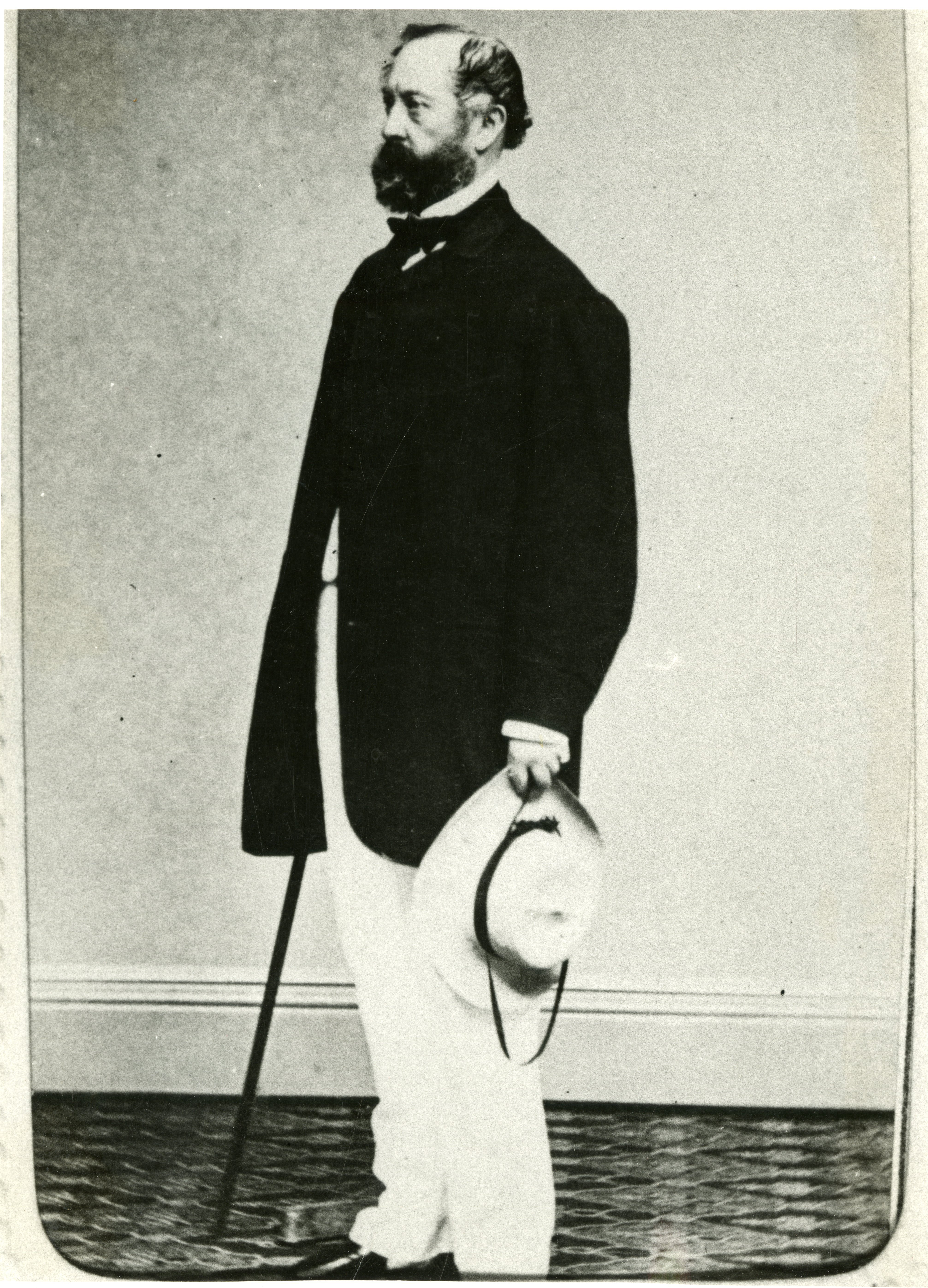 Mr. T.M. Roest van Limburg, minister van Buitenlandse Zaken a.i. 8 juni 1868 tot 1 september 1868; minister van Buitenlandse Zaken 1 september 1868 tot 12 december 1870 Collectie Foto's Identificatienr. 1.66386 Vervaardiger naam [ onbekend ] Datering ca. 1870 Opname Aantal 1 Object zwart-witfoto Afmetingen (h x b) 23 x 17 cm